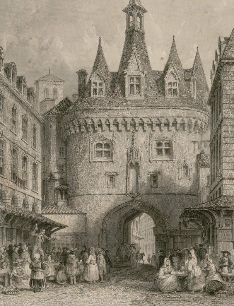 Gravure de J Carter d'après un dessin de Thomas Allom (1804-1872)